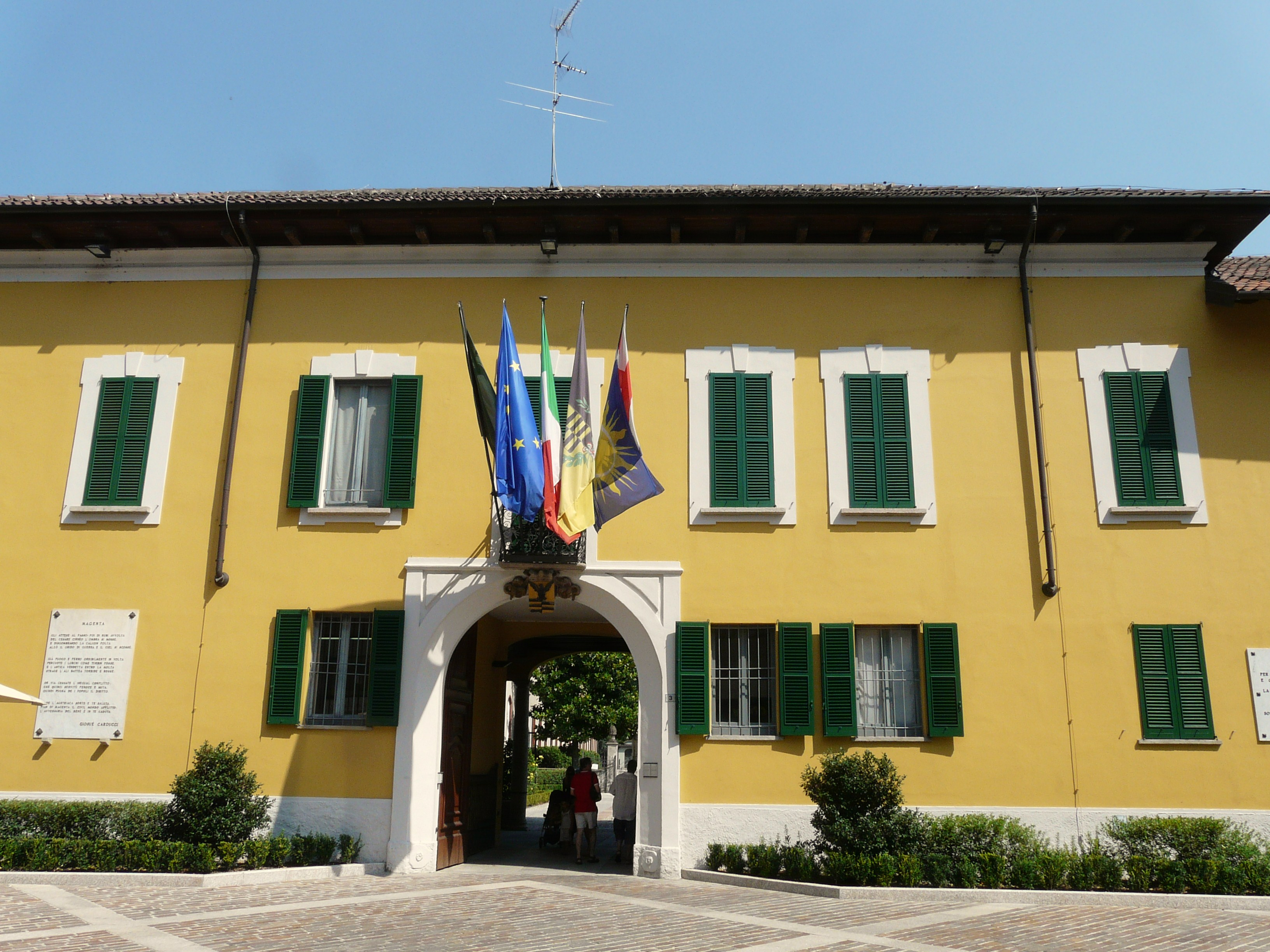 Palazzo municipale, Magenta, Lombardia, Italia